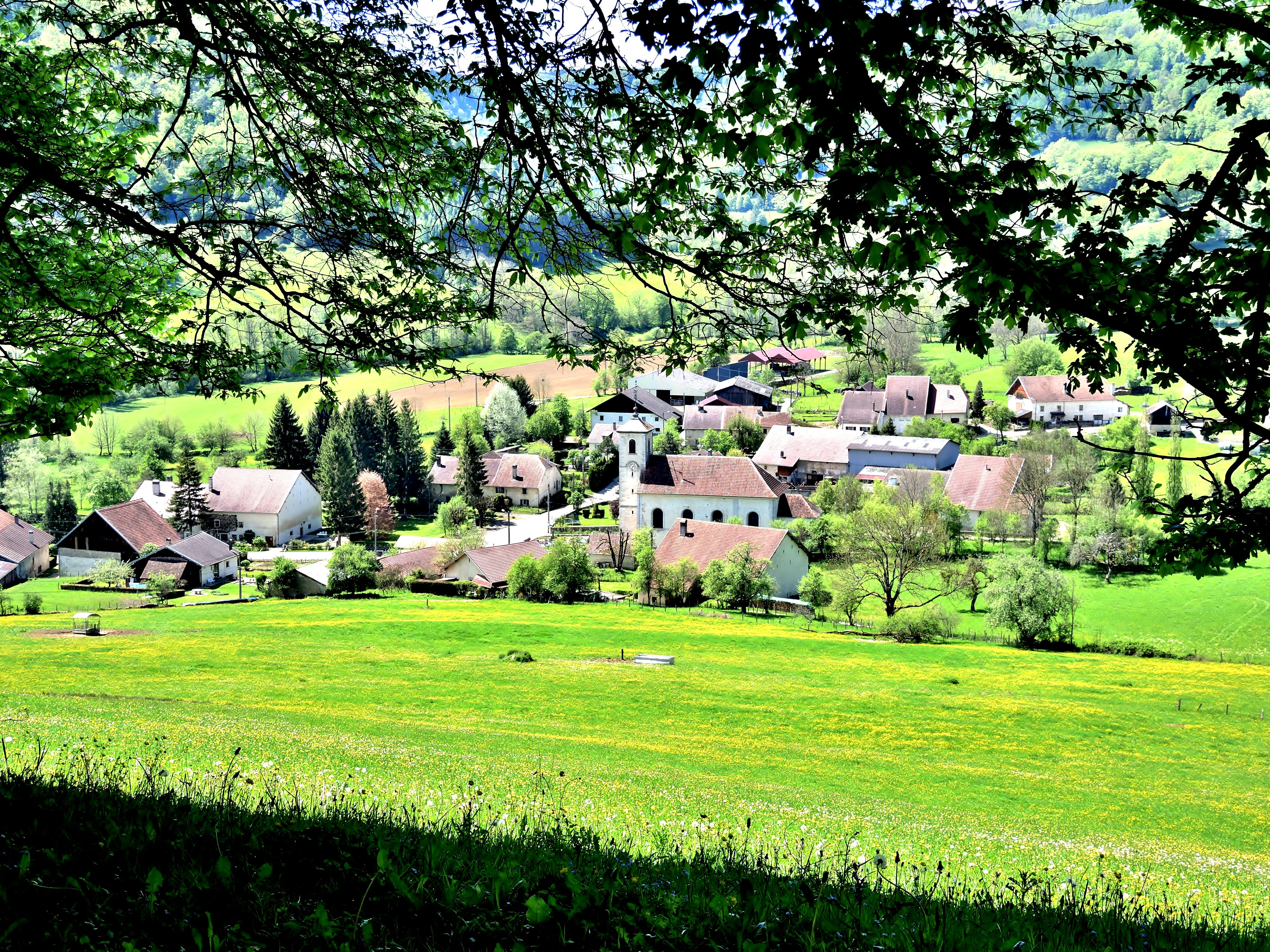 Panorama sur le village de Vauclusotte, depuis la route de Valoreille.